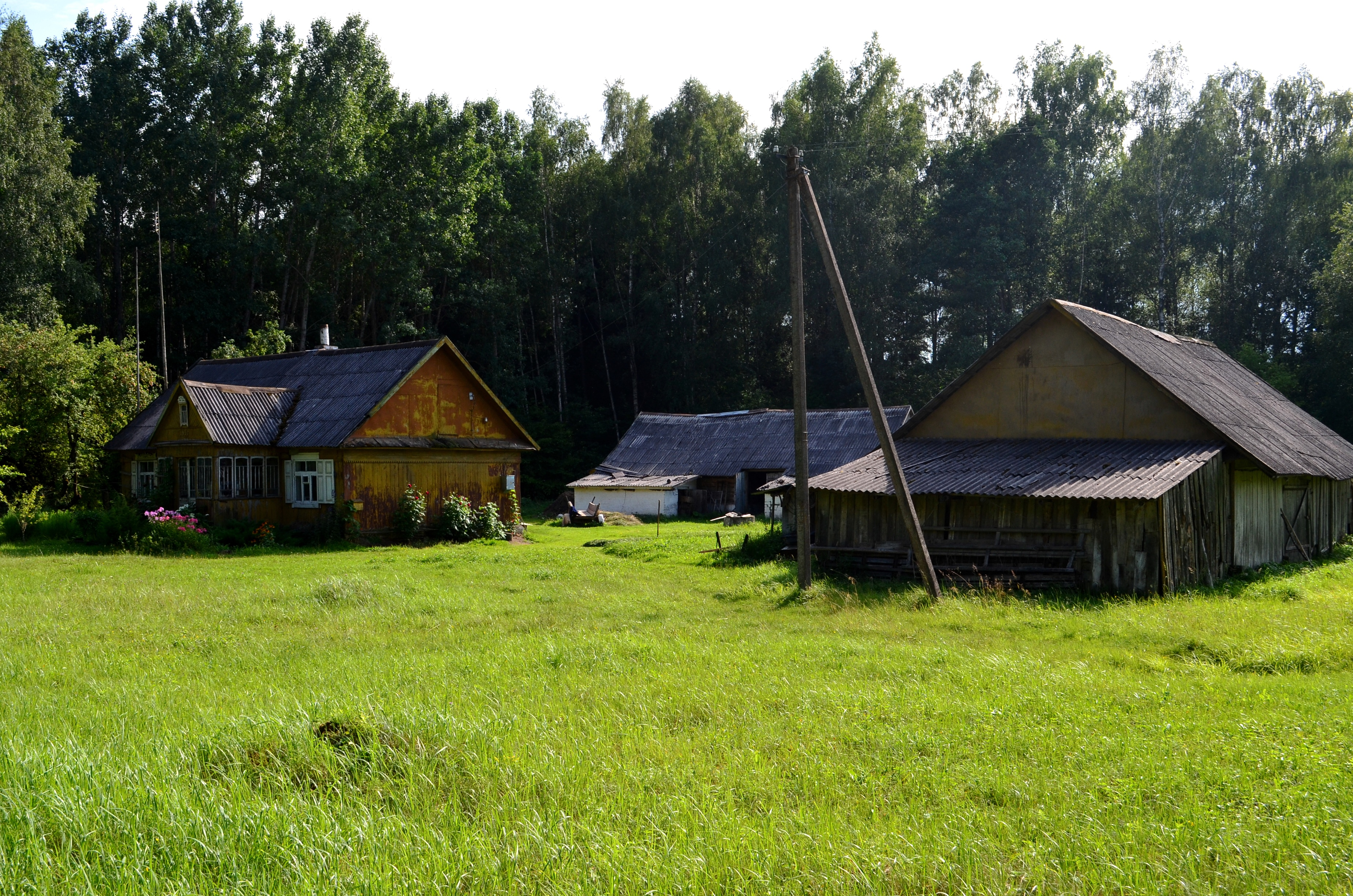 Pociškės k., Adutiškio sen., Švenčionių raj.